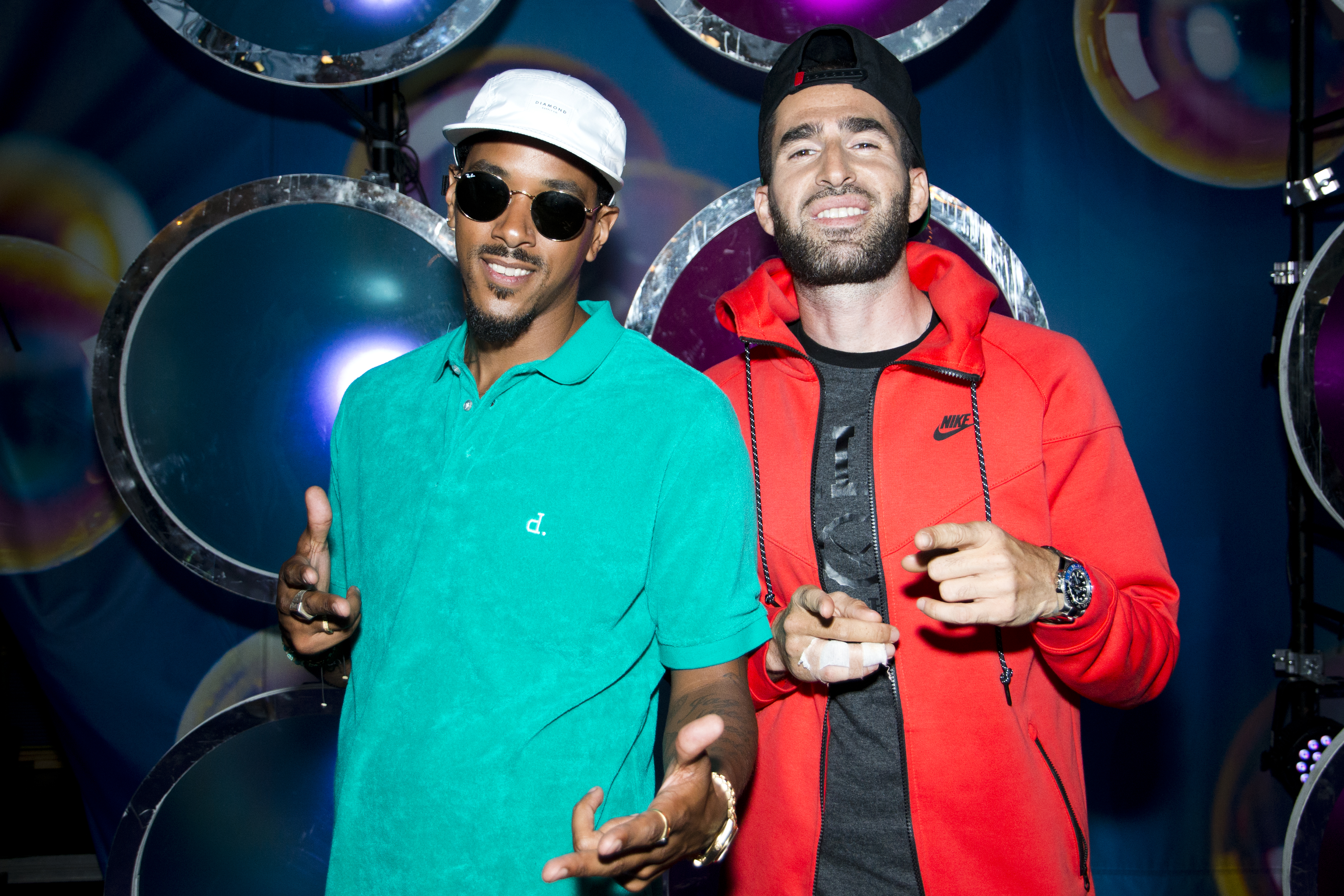 Nääk & Nimo besöker Sommarkrysset på Gröna Lund i Stockholm